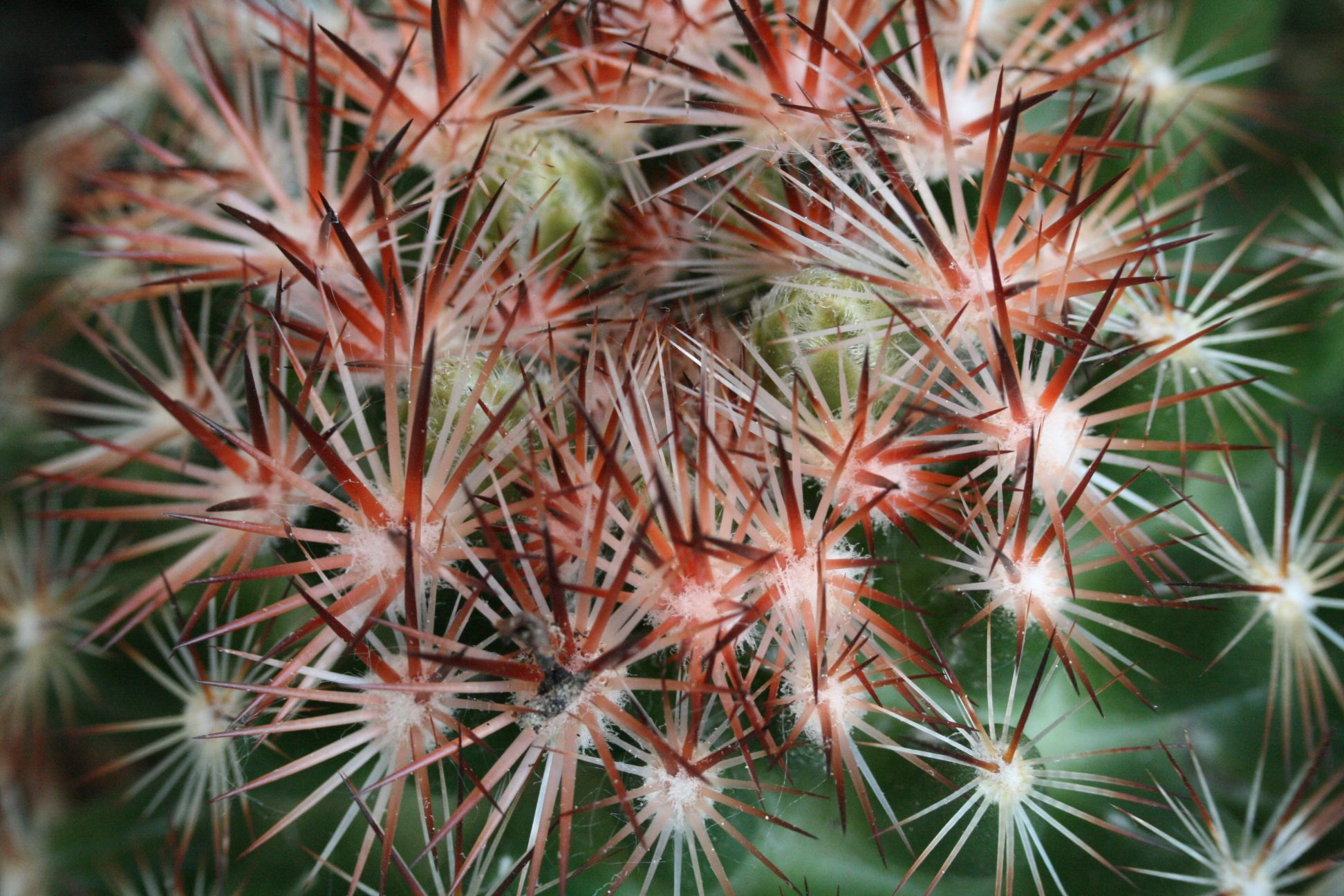 Ecobaria vivipara var. bisbeana mammillái